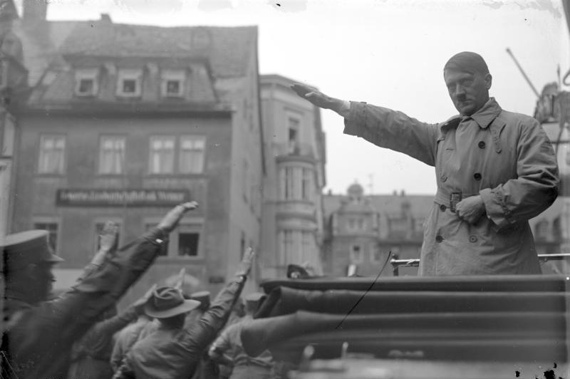 Adolf Hitler kandidiert für die Reichspräsidentenwahl ! Neueste Aufnahme Adolf Hitlers, welcher von den Nationalsozialisten als Kandidat für die Reichspräsidentenwahl aufgestellt wurde.